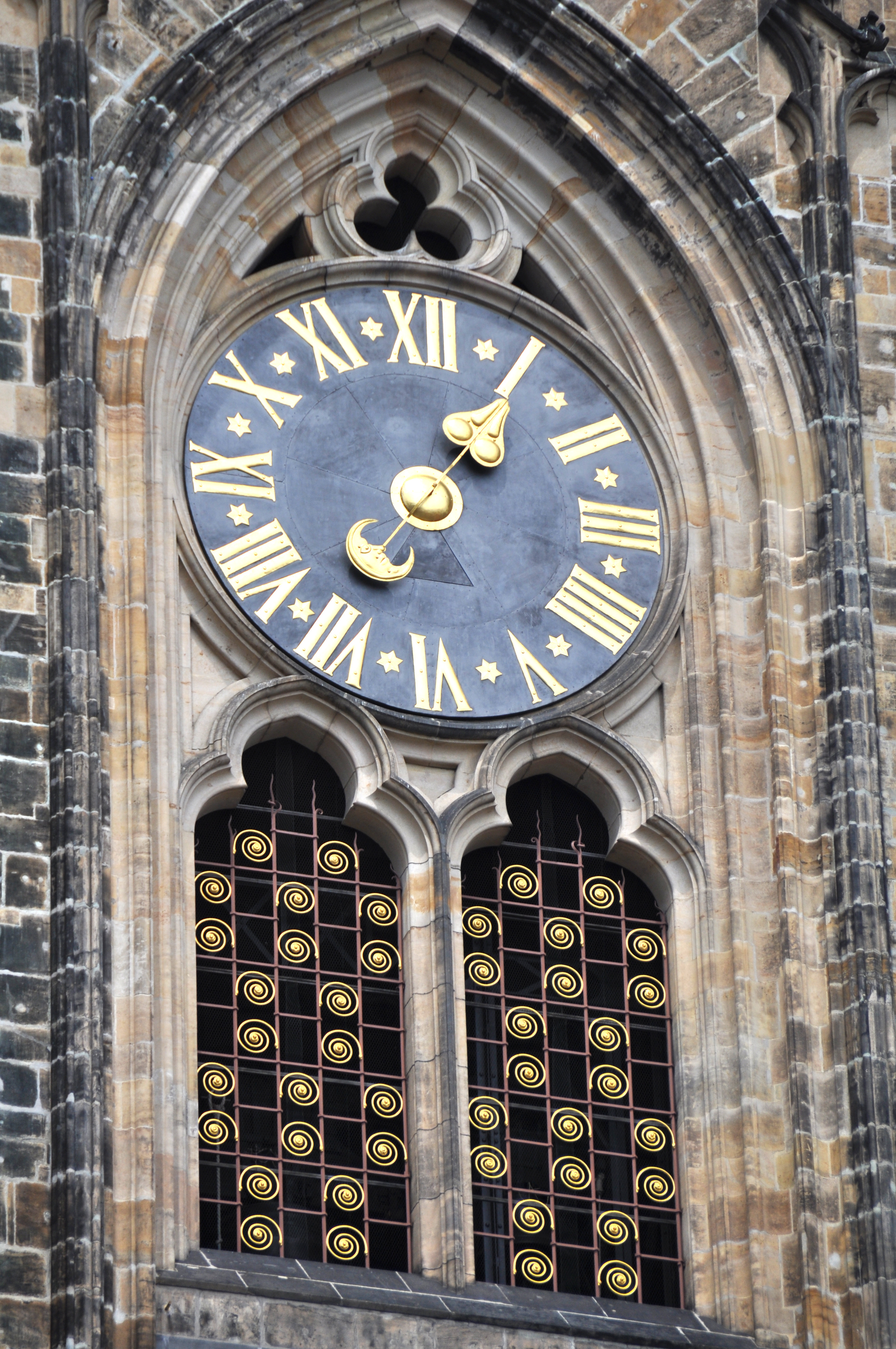 Prag